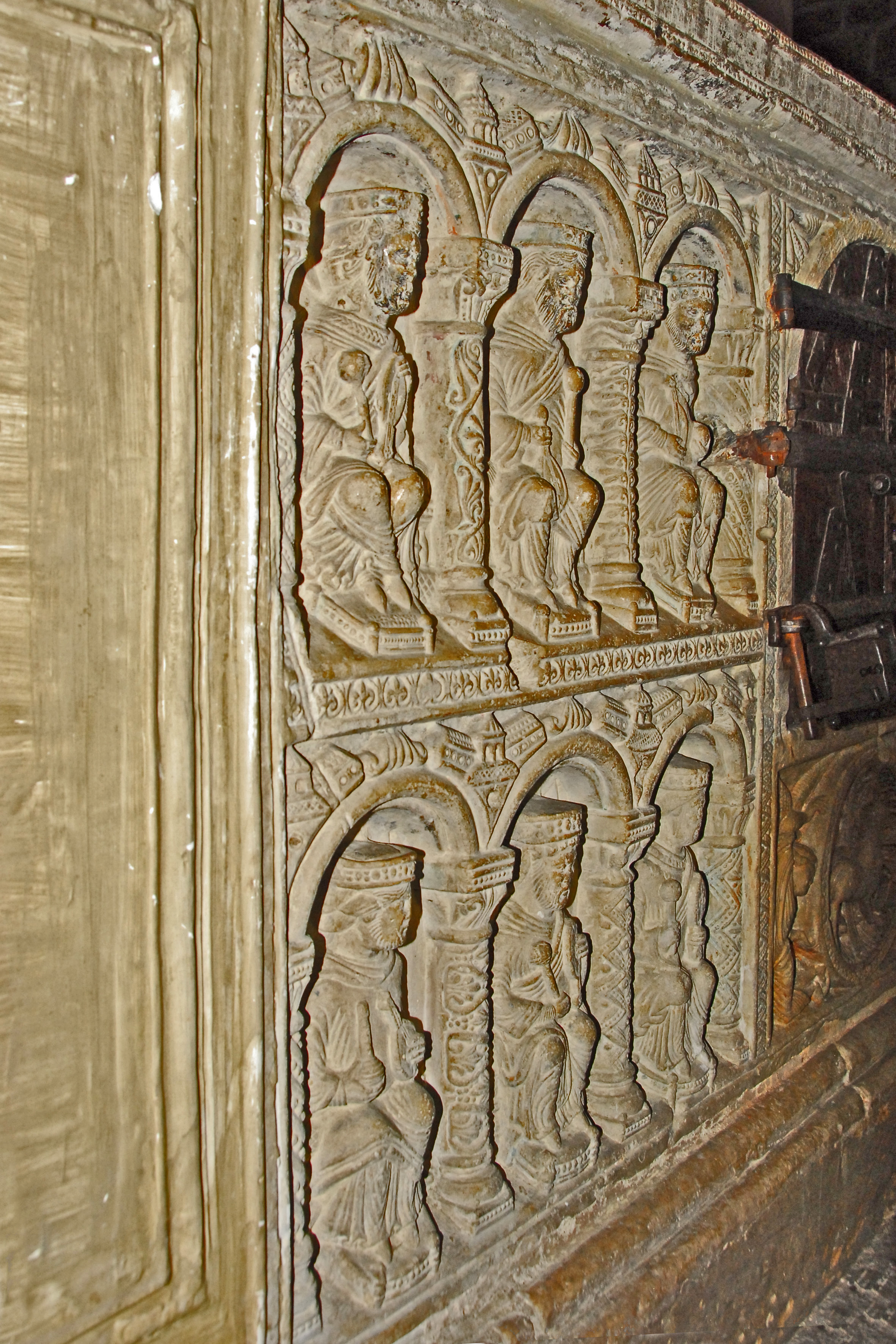 St-Junien, Sarkophag, Südseite, Relief von SW